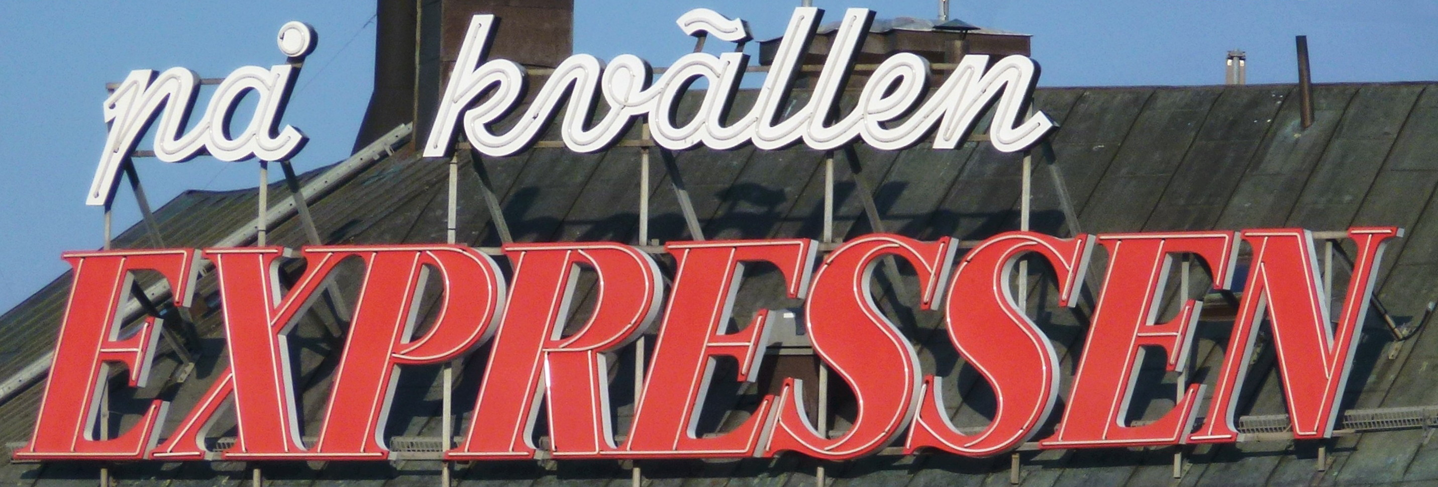 På kvällen EXPRESSEN, neonskylt på Medusa 1